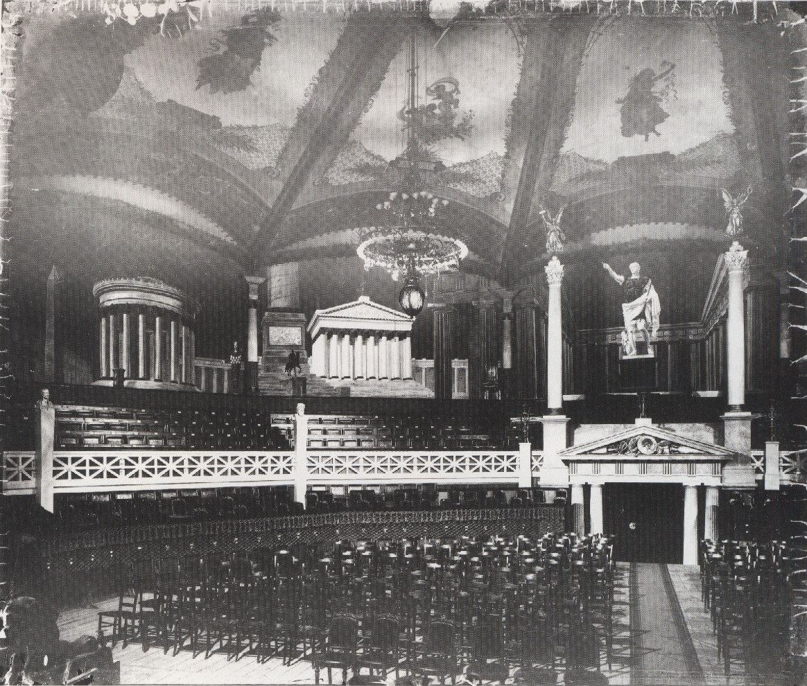 Innenansicht der Alberthalle in Leipzig, Wintergartenstraße 17-19, um 1890